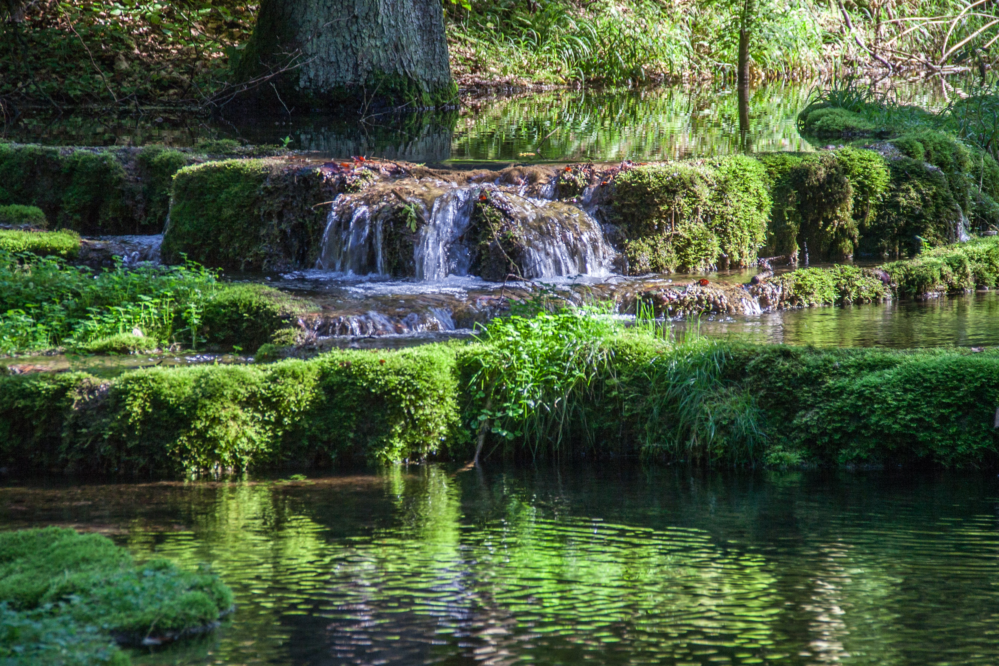 Kaisinger Tal, Sinterterrassen